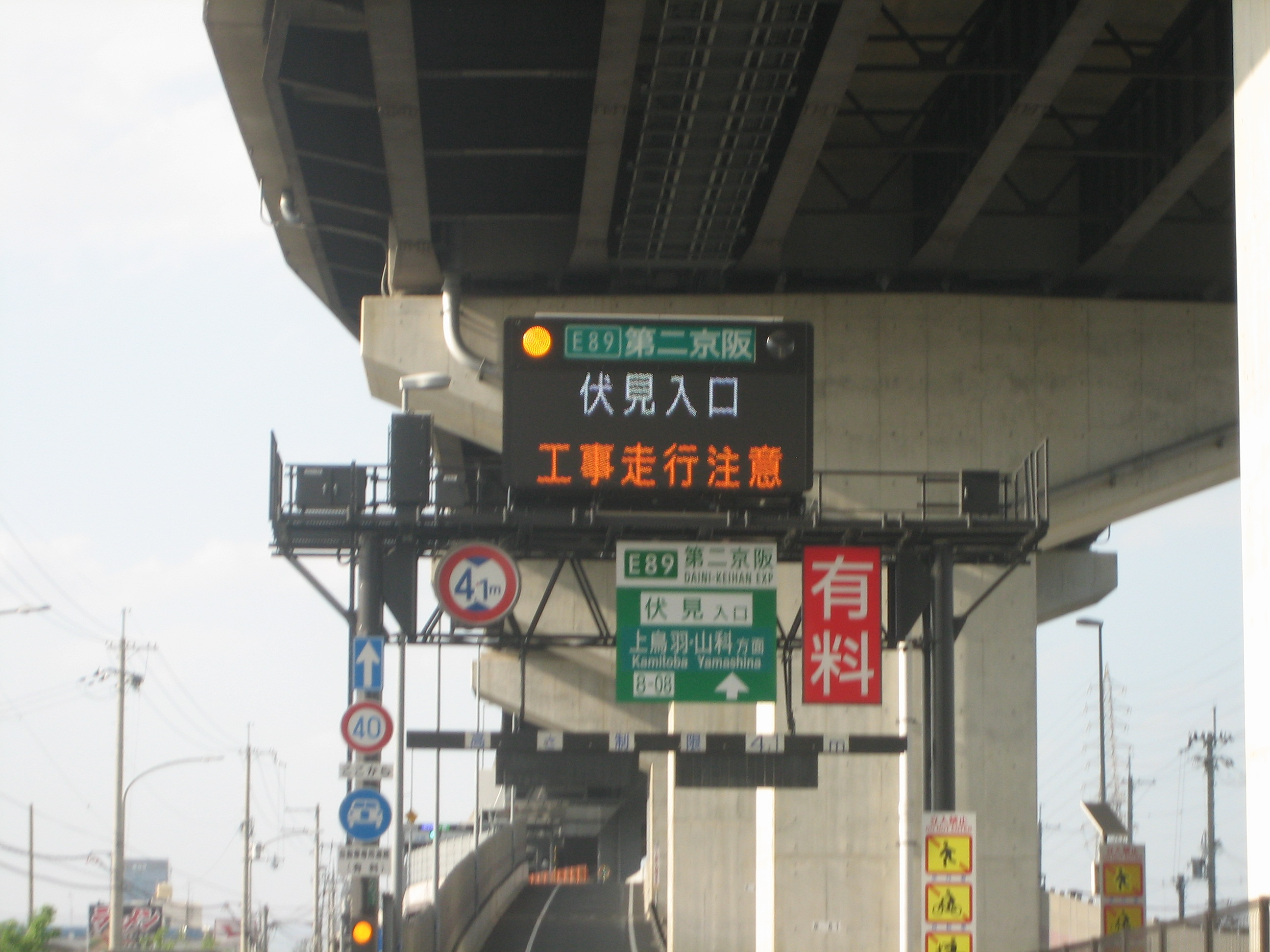 伏見IC出口